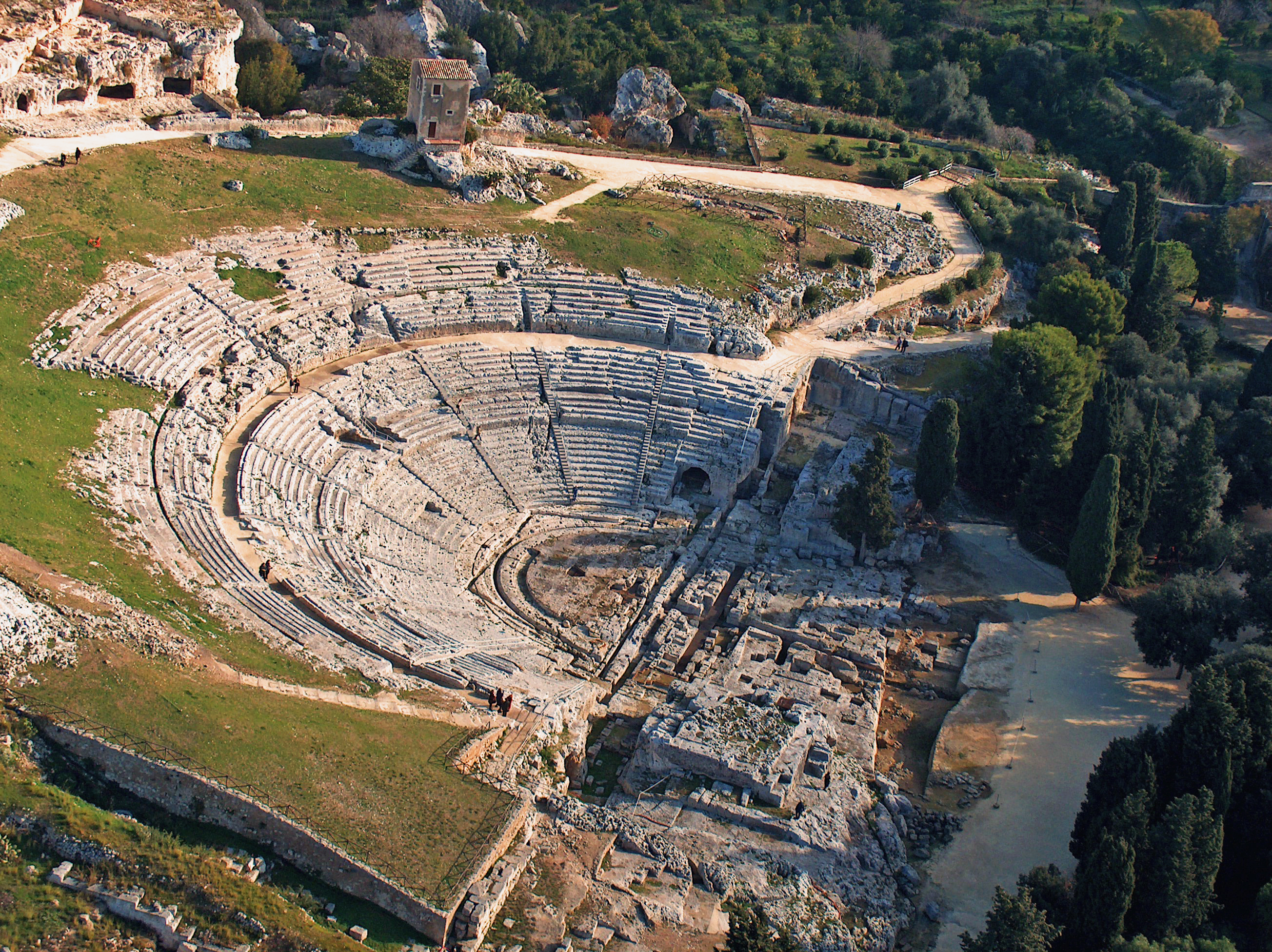 Teatro greco di Siracusa